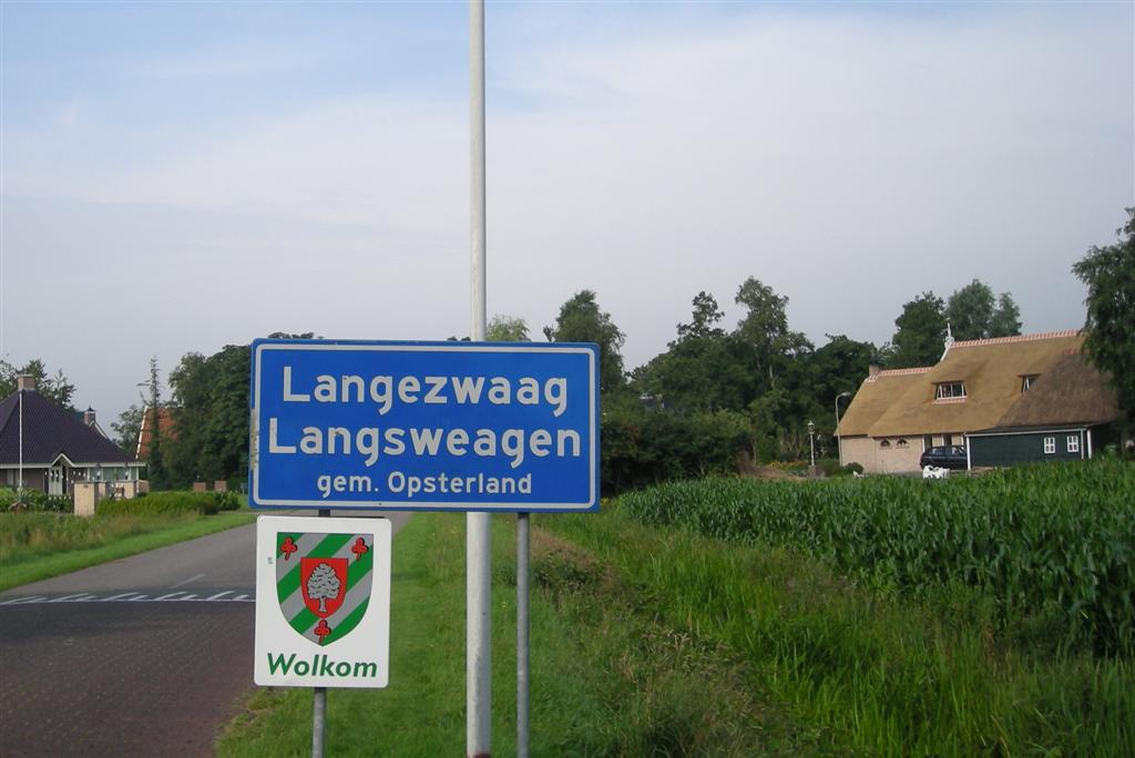 Kombord van Langezwaag, dorp in Friesland